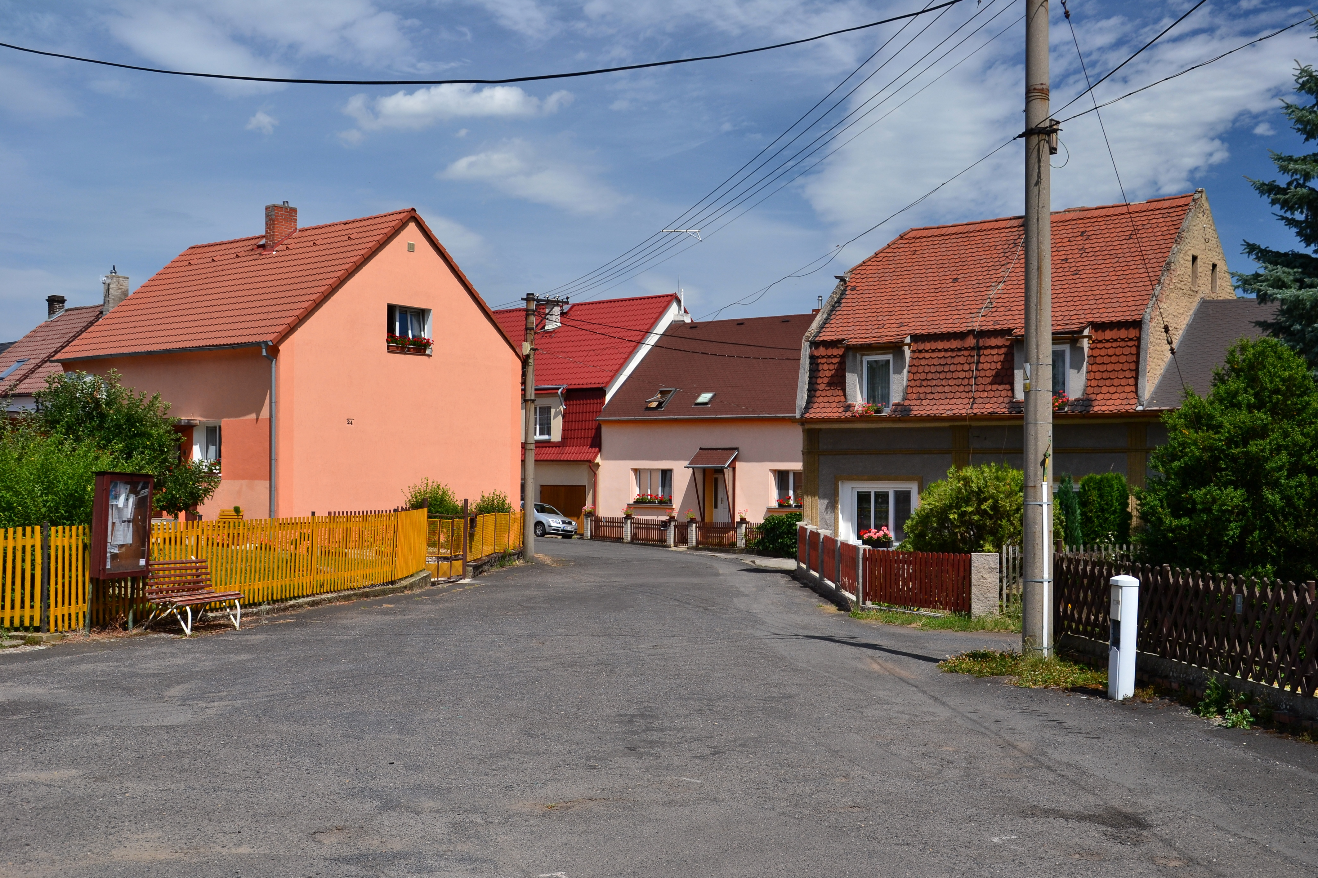 Náves